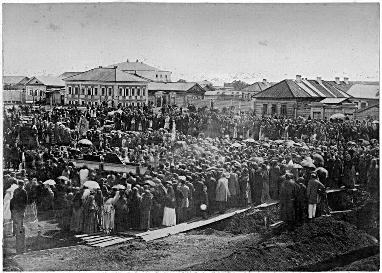 Закладка здания, пожертвованного купцом Подаруевым, для Тюменского АЛЕКСАНДРОВСКОГО реального училища, совершённая 31 Мая 1877 года, в сорокалетнюю годовщину посещения города Тюмени в Бозе почившим ИМПЕРАТОРОМ АЛЕКСАНДРОМ НИКОЛАЕВИЧЕМ, в бытность Его Наследником Престола.